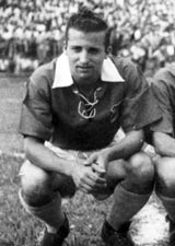 Camilo Cervino, futbolista argentino